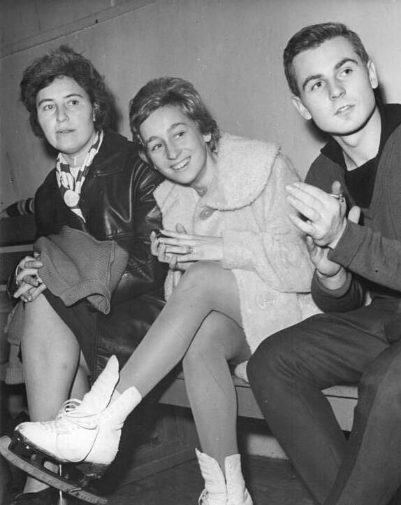 Ralph Borghardt, Heidi Steiner, Inge Wichnewski Zentralbild Kohls Wen.-ga. 16.12.1962 Berliner Meisterschaften im Eiskunstlauf. Die gesamte Eiskunstlauf-Spitzenklasse der DDR mit Ausnahme von Gabriele Seiffert (Karl-Marx-Stadt) beteiligte sich am 15.- und 16.12.1962 in der Werner Seelenbinder-Halle an den Berliner Meisterschaften. UBz: Zwei Berliner Meister applaudierten für ihre Konkurrenten: Ralph Borghardt, Heidi Steiner (beide SC Dynamo) und ihre Trainerin Inge Wichnewski.